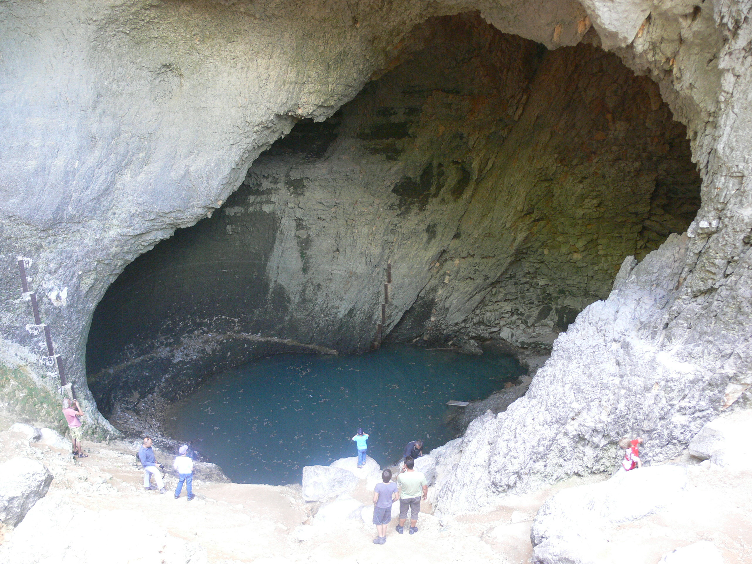 Fontaine de Vaucluse - résurgence